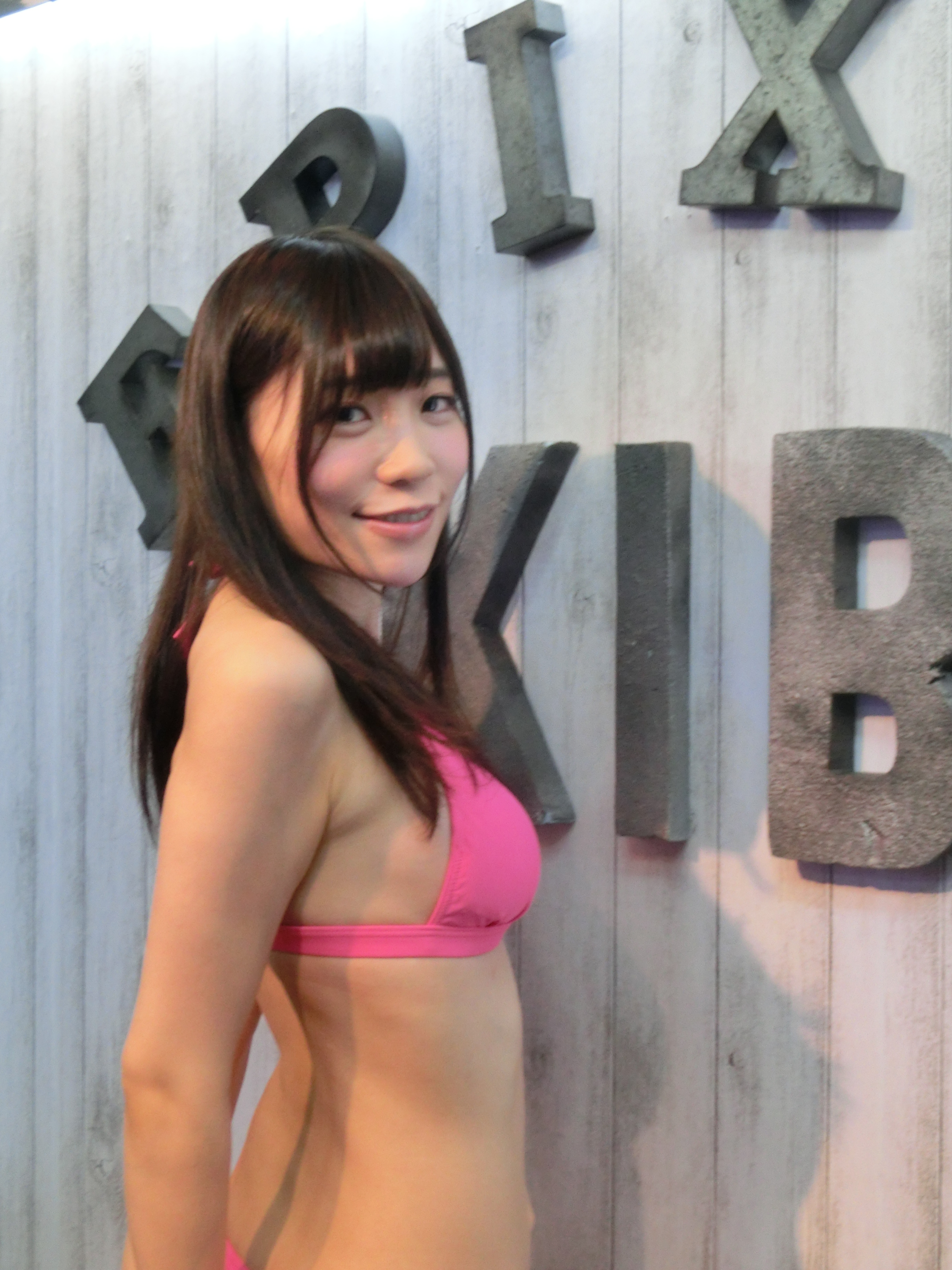 富田優衣 (とみたゆい)